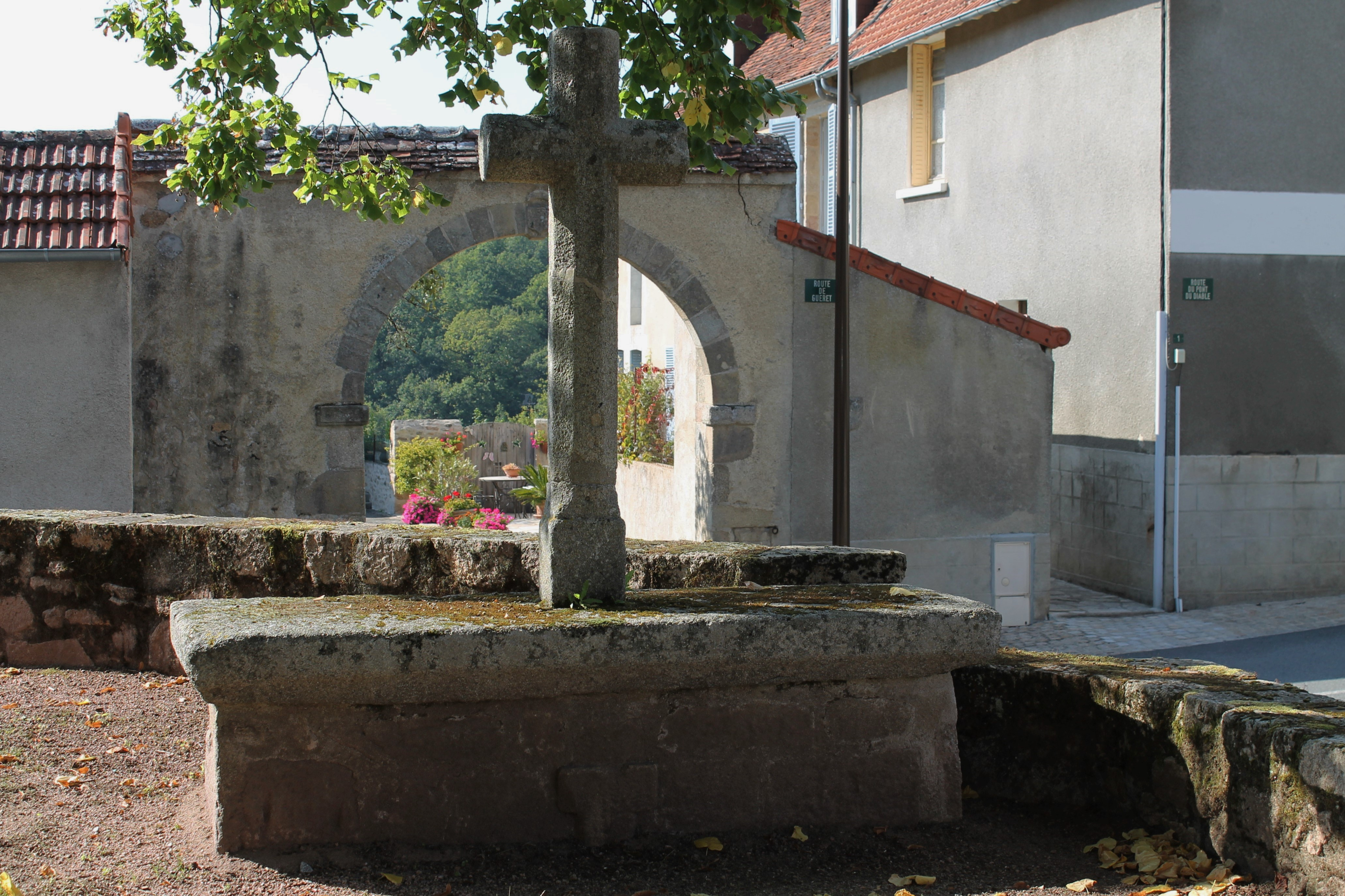 Le calvaire